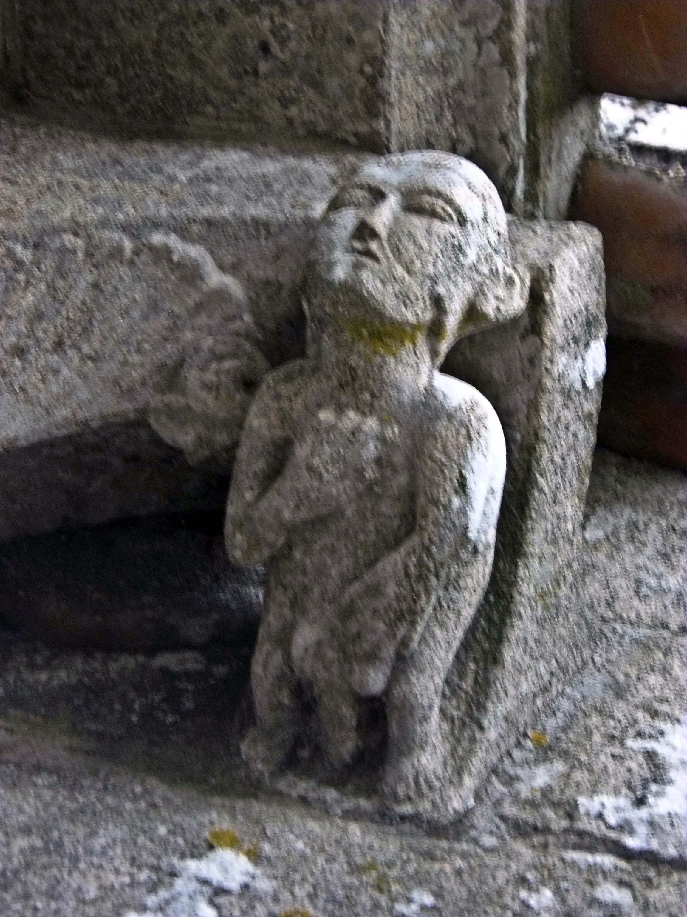 Canzorro de Igrexa de San Pedro de Ansemil